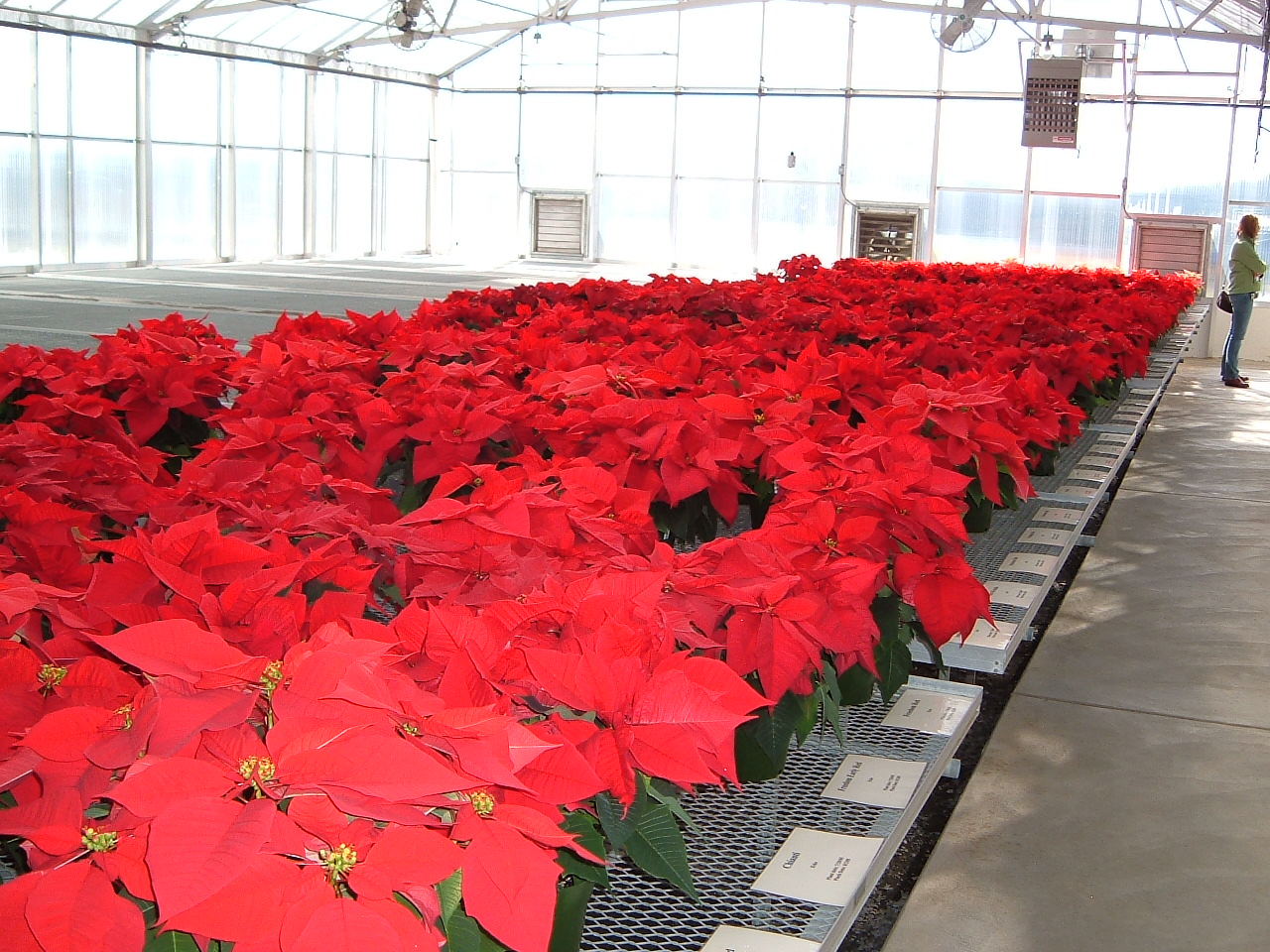 Source: Max Wahrhaftig